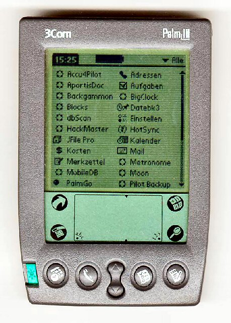 Motiv: PDA Palm III von 3Com mit PalmOS Abbildung erzeugt als Scanner-Art von Agon S. Buchholz (asb) Aufnahmegerät: Hewlett-Packard ScanJet 3c Bildspende von: [1]